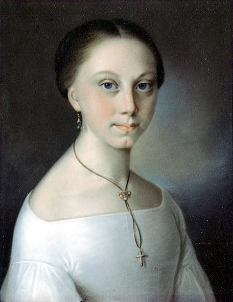 Franziska Riotte, Kunstmalerin, Buchautorin